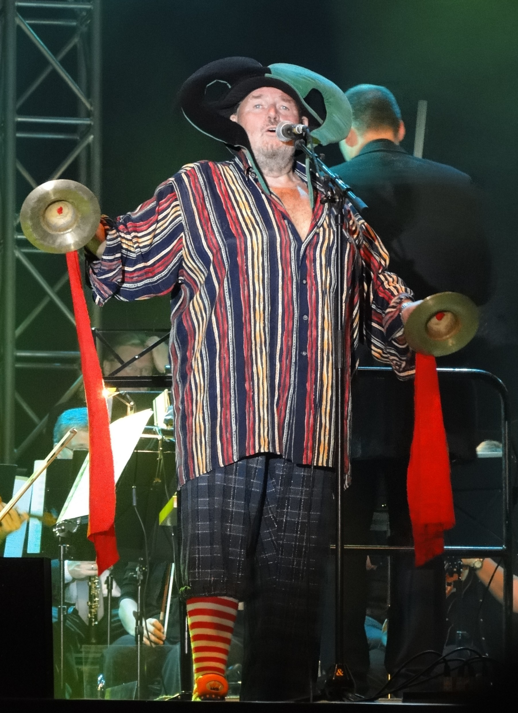 Peter "Mampe" Ludewig im typischen Kostüm während der Interpretation des Liedes "Der grüne Esel" auf einem Konzert von Electra